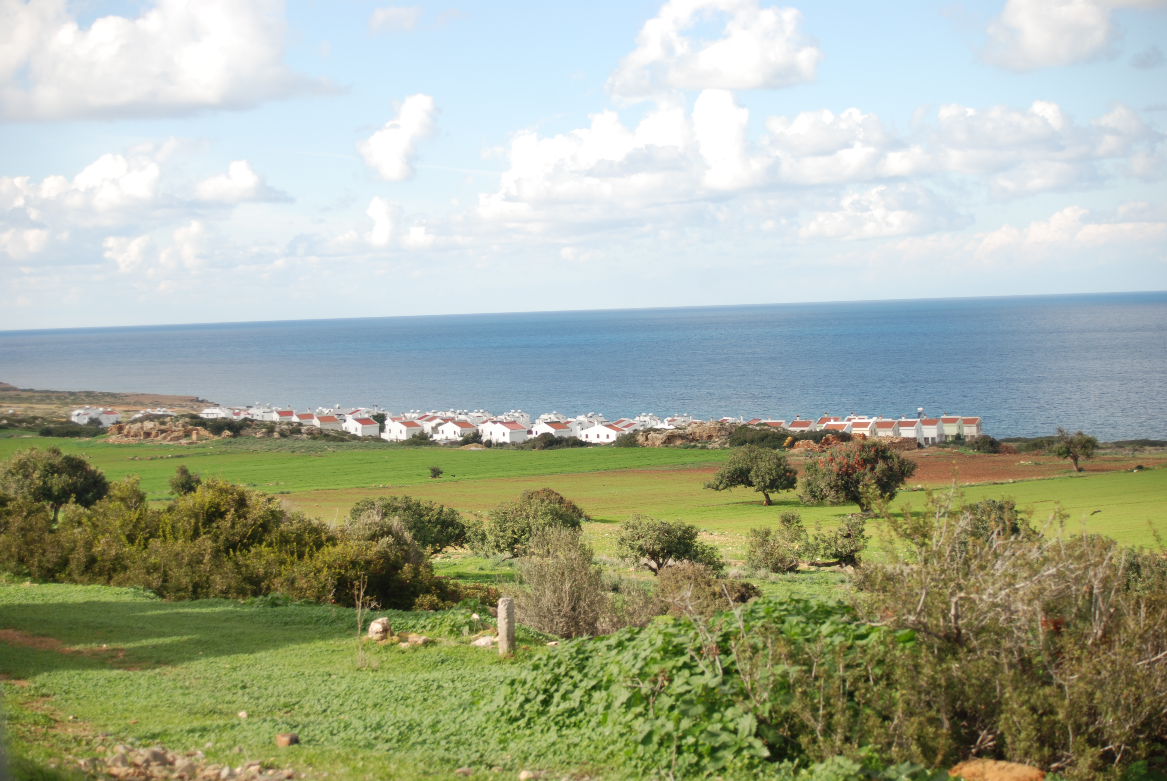 Livera, Cyprus